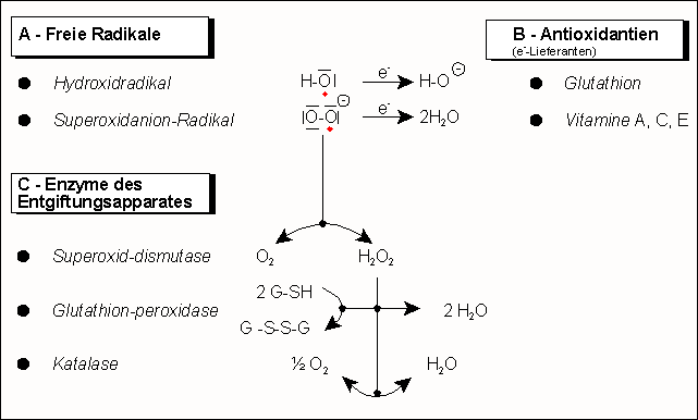 Für Vorlesungszwecke selbst angefertigtes Schema (JBO 2003)